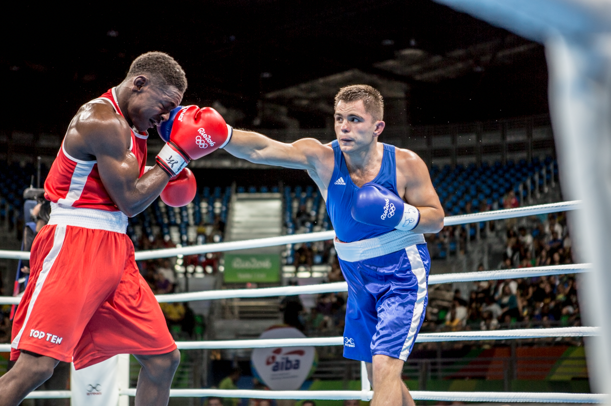 Day 3